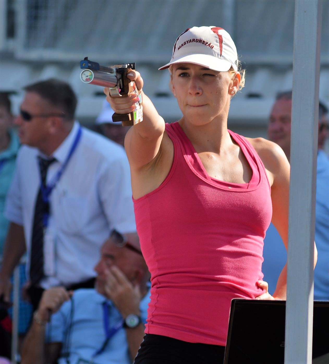 Kovács Sarolta világbajnok magyar öttusázó